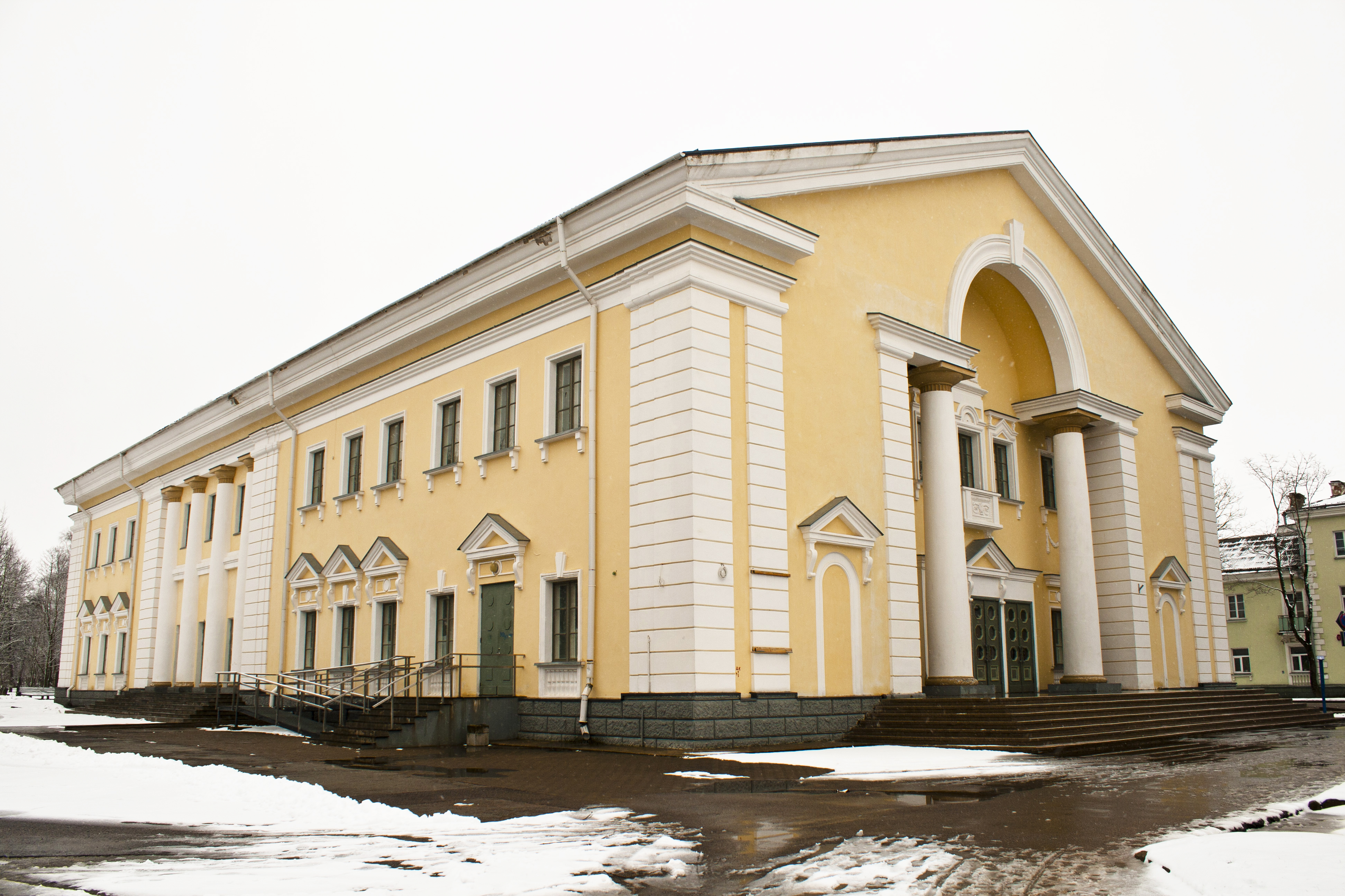 Sillamäe kultuurimaja